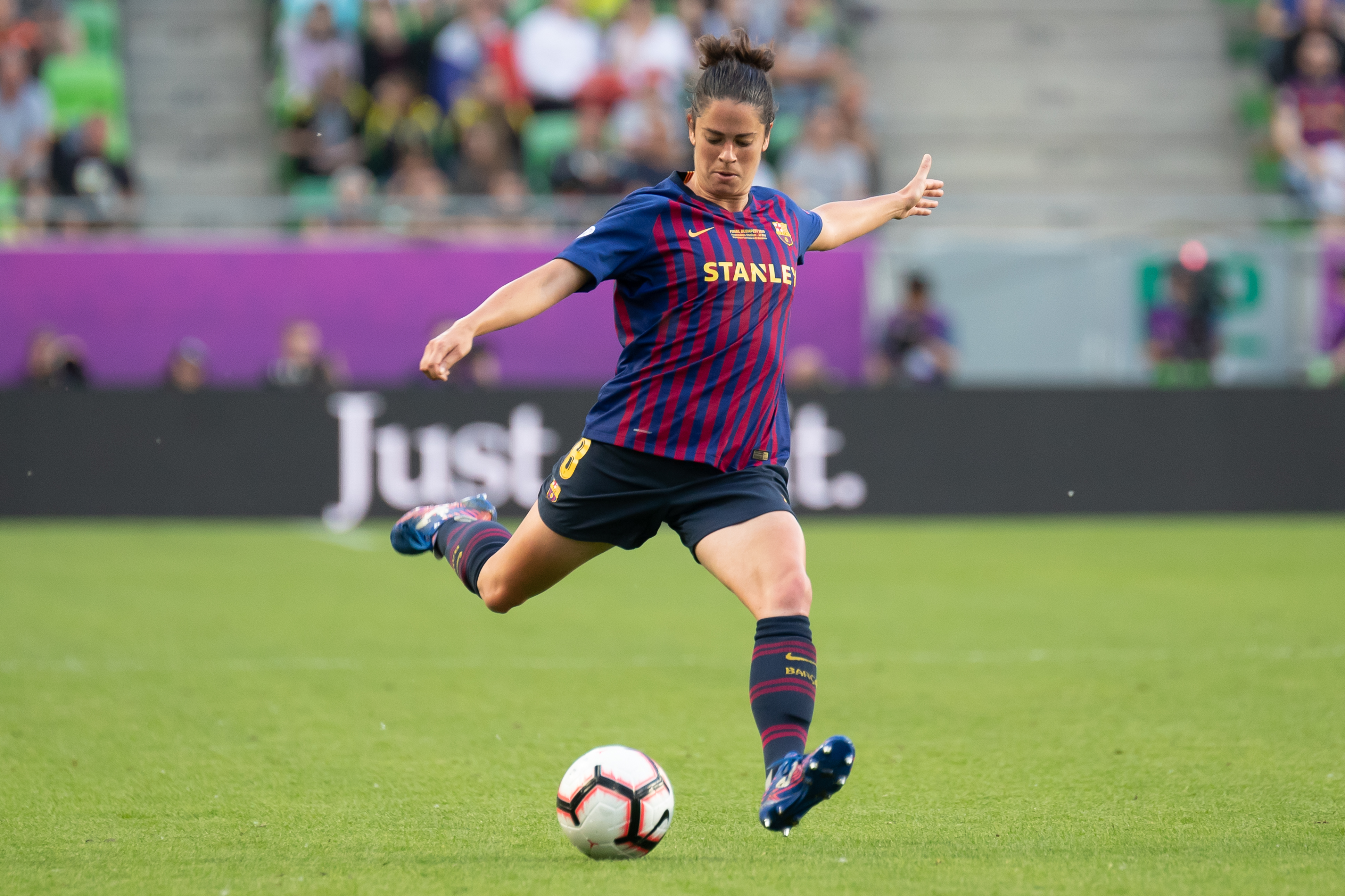 Fußball, Frauen, UEFA Women's Champions League, Olympique Lyonnais - FC Barcelona; Marta Torrejon (FC Barcelona, 8); Freisteller, Einzelbild, Aktion, action